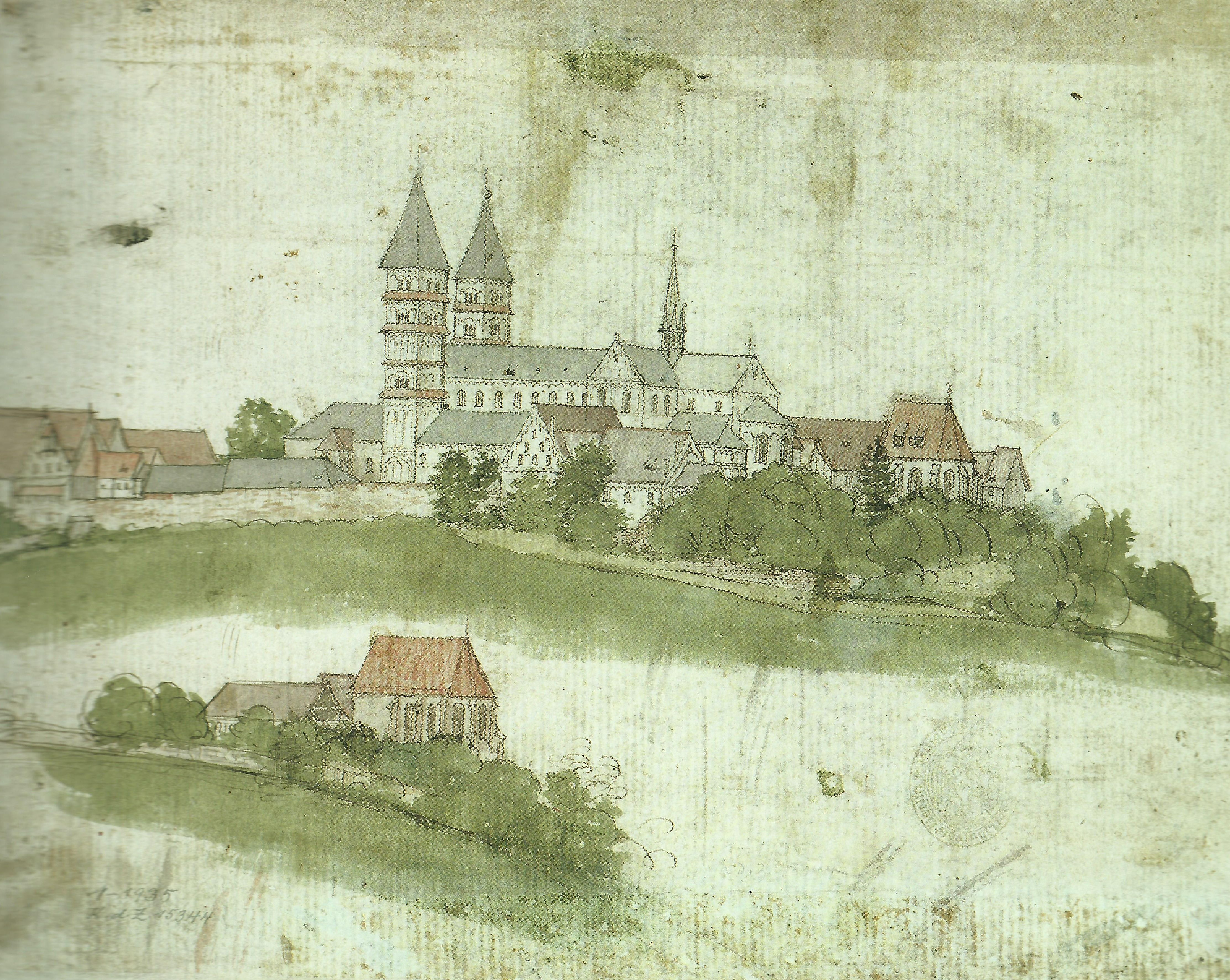 Kloster Michelsberg in Bamberg. Stiftung Preußischer Kulturbesitz, Kupferstichkabinett: "Feder in Braun, Deckfarben (um 1480/85) von Wolfgang Katzheimer Blattmaß 27,5 x 34,9 cm untere Hälfte des Blattes Inventar-Nr.: KdZ 15344 verso"